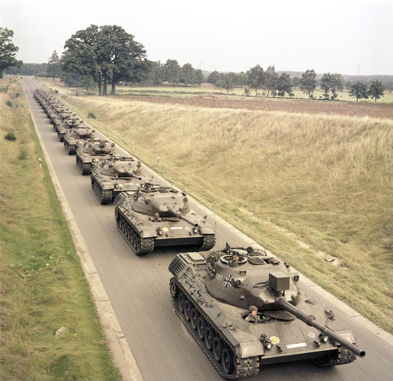 Reportage Bundeswehr Munsterlager: Leopardenpanzer [Munsterlager, Truppenübungsplatz in der Lüneburger Heide]